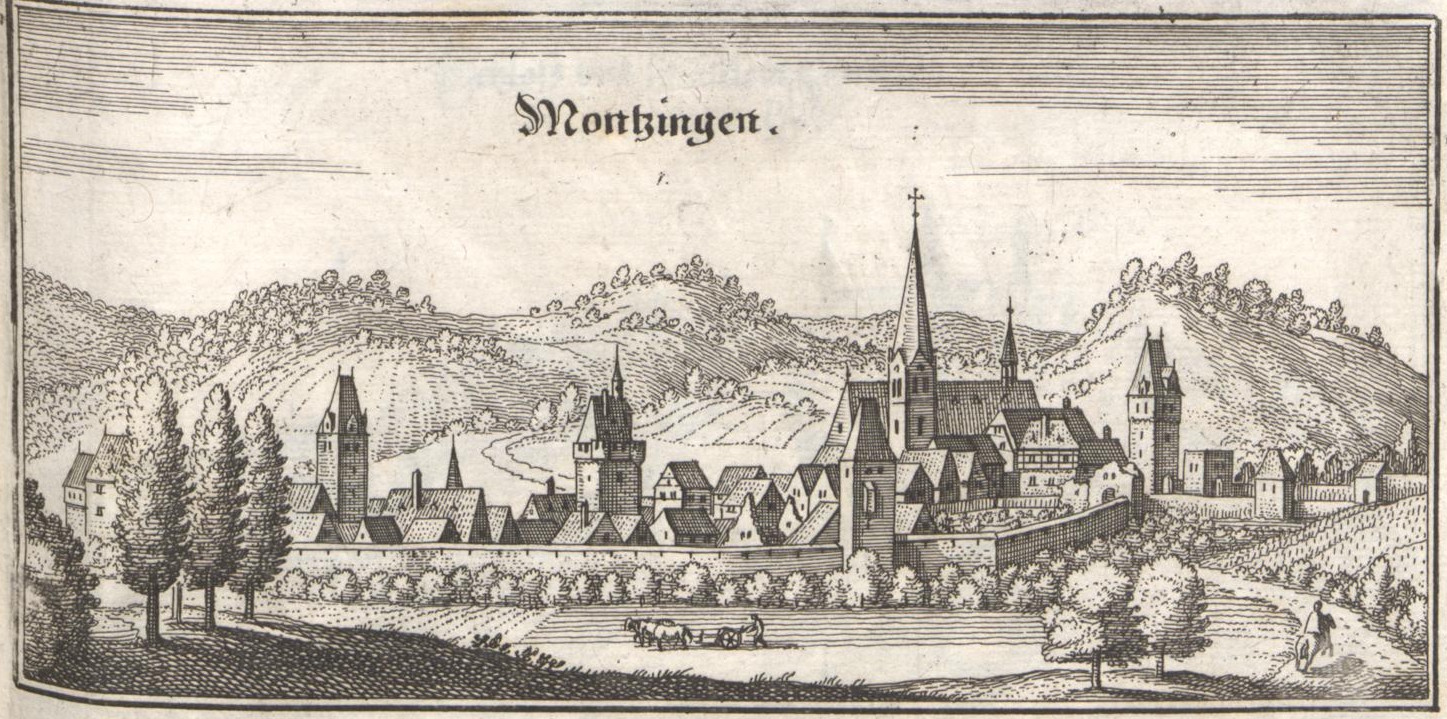 Monzingen